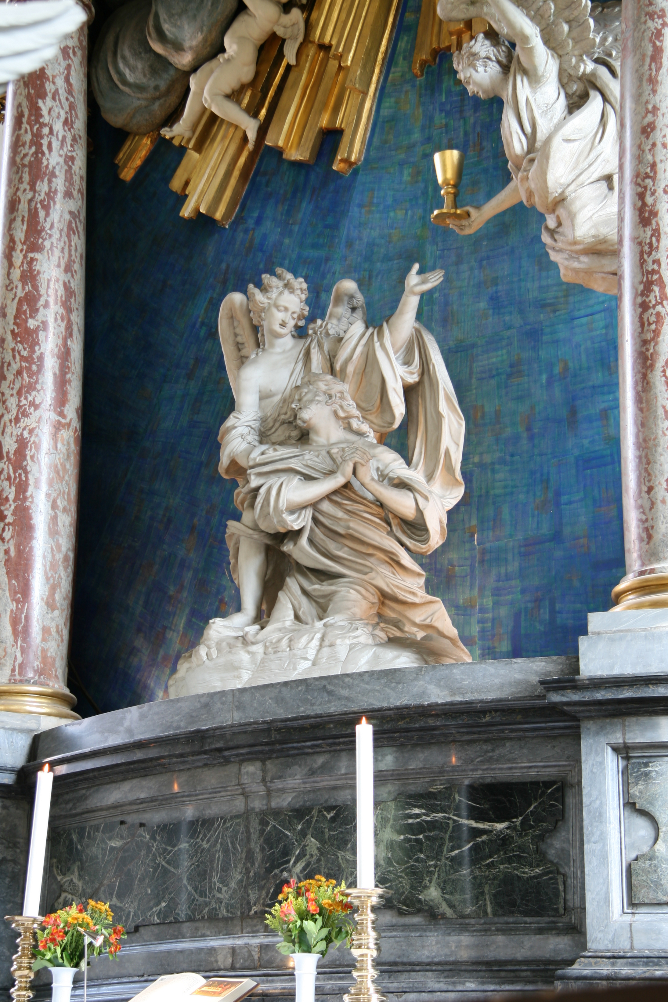 Vor Frelser Kirke (Church of Our Saviour), Copenhagen, Denmark. Altar detail